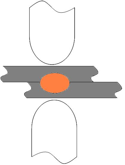 Tipo de soldadura por roladanas o costura